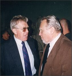 Andrzej Miłosz (1917-2002), Polish film director and translator. Brother of Czesław Miłosz (1911-2004)